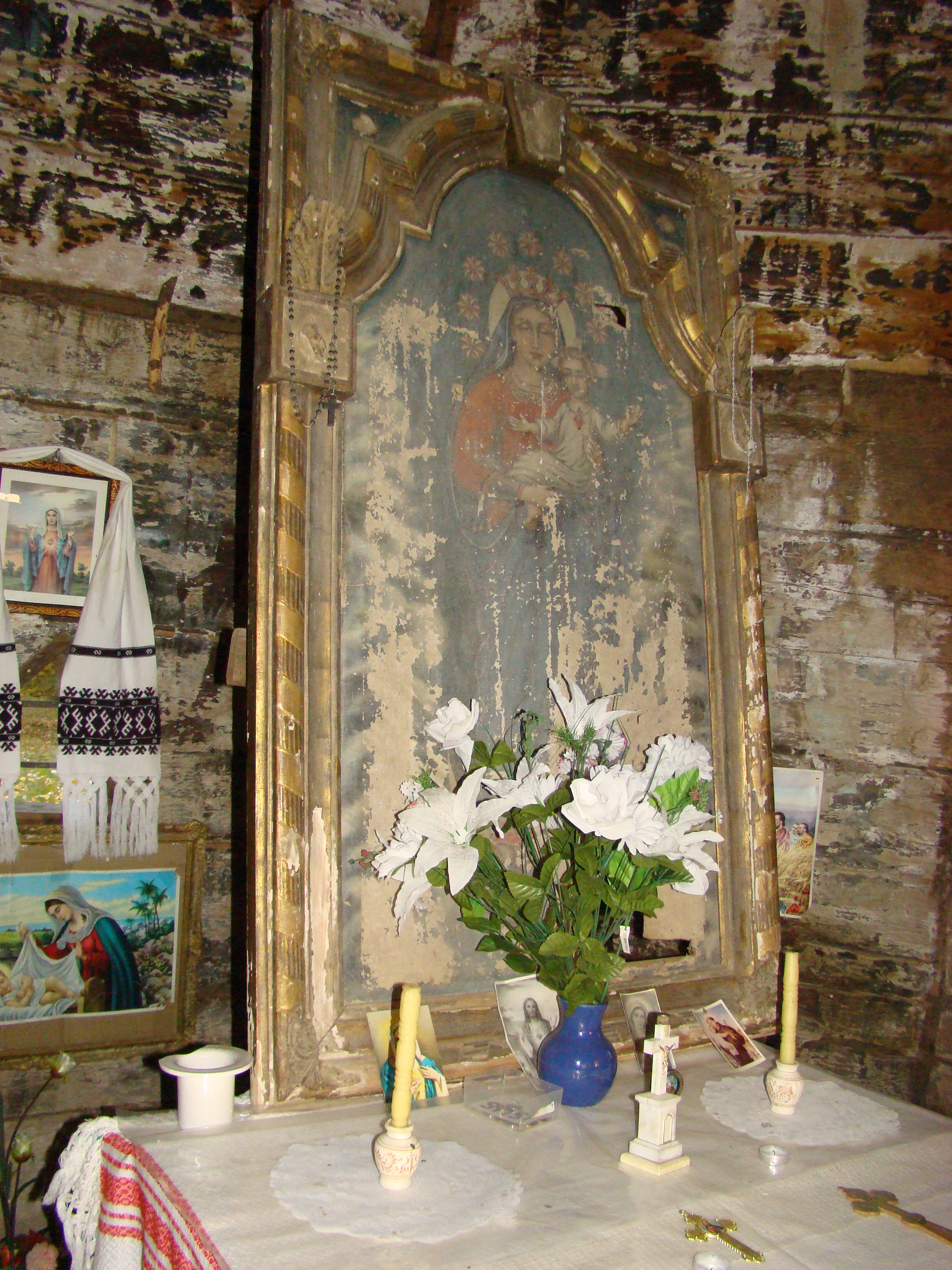 Absida bisericii de lemn, sat Șișești; comuna Șișești, județul Maramureș